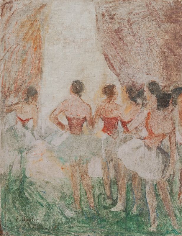 Vor dem Auftritt. Wohl um 1912. Öl auf Leinwand. 50 x 38,7 cm